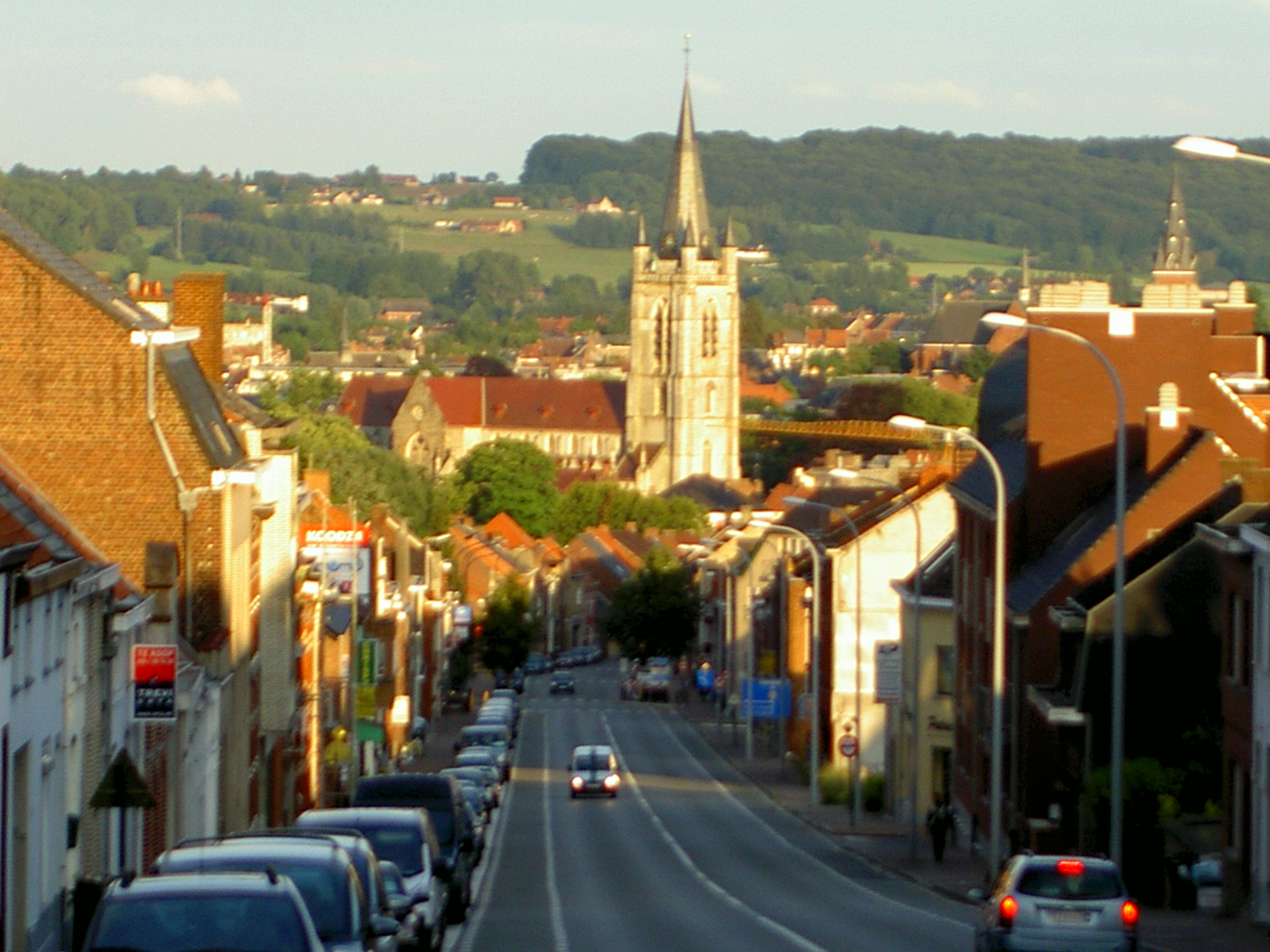 Ronse. Het centrum, Kruisstraat en Sint Hermes kerk - (Renaix : Le centre, rue de la Croix et l'Eglise Saint Hermes).